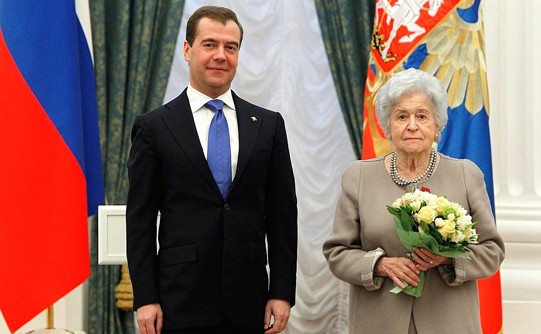 Вручение государственных наград. Орденом «За заслуги перед Отечеством» IV степени награждена директор Государственного Музея изобразительных искусств имени А.С.Пушкина Ирина Антонова.